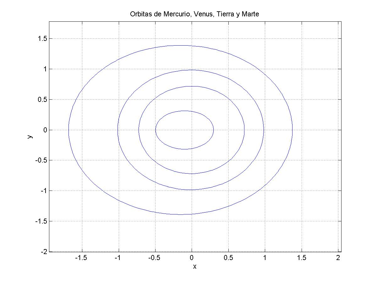 Orbitas planetarias de mercurio, venus, tierra y marte a partir de sus respectivas ecuaciones de movimiento, en matlab.